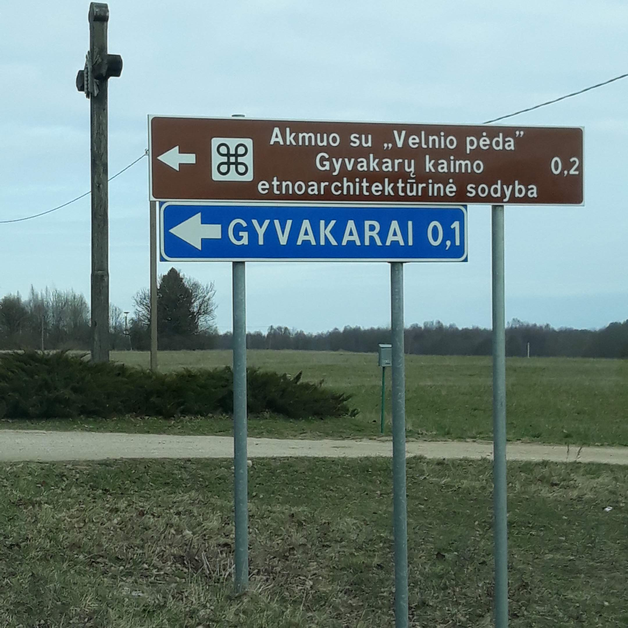 Nuoroda į "Velnio akmenį"